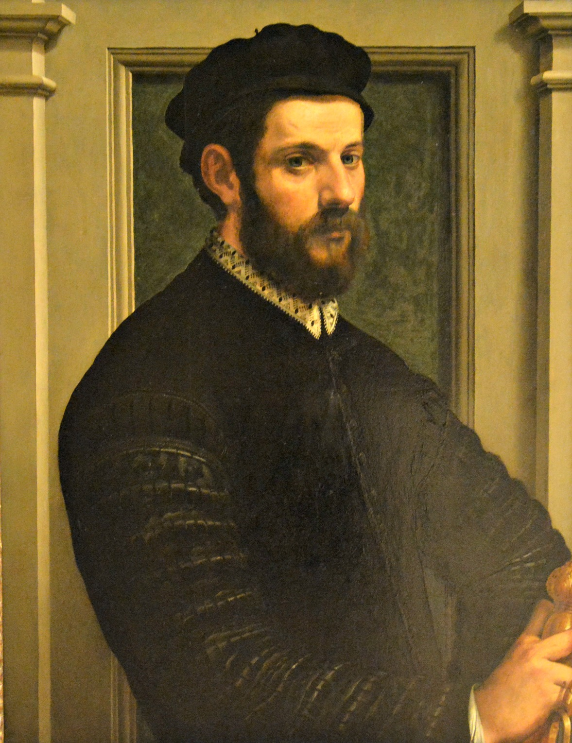 Vedi titolo